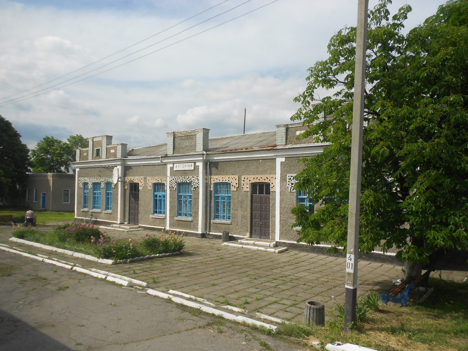 Залізнична станція Антоніни